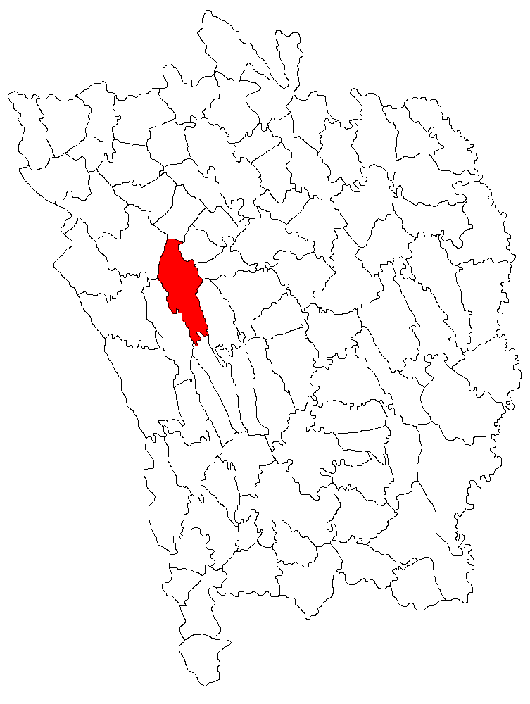 Categorie:Hărţi ale judeţului Vaslui